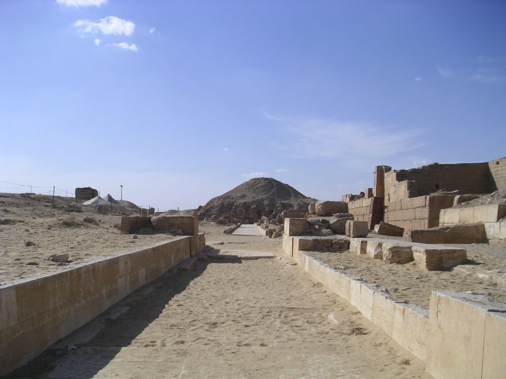 Vue des vestiges du temple funéraire et de la pyramide d'Ounas à Saqqarah - Ve dynastie